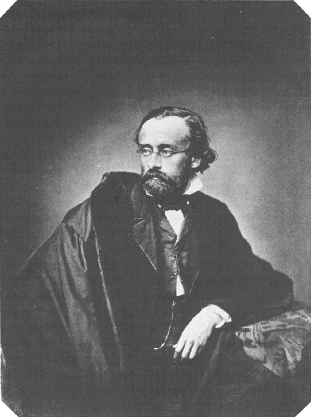 Eduard Schhleich (1812-1874)